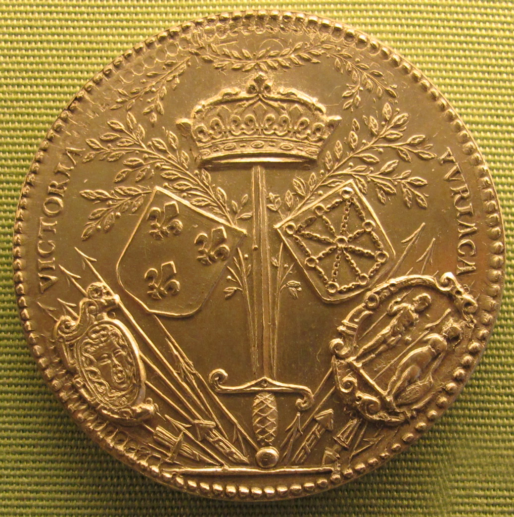 Philippe danfrie il vecchio, enrico IV di francia, verso con stemma e trofei, 1590